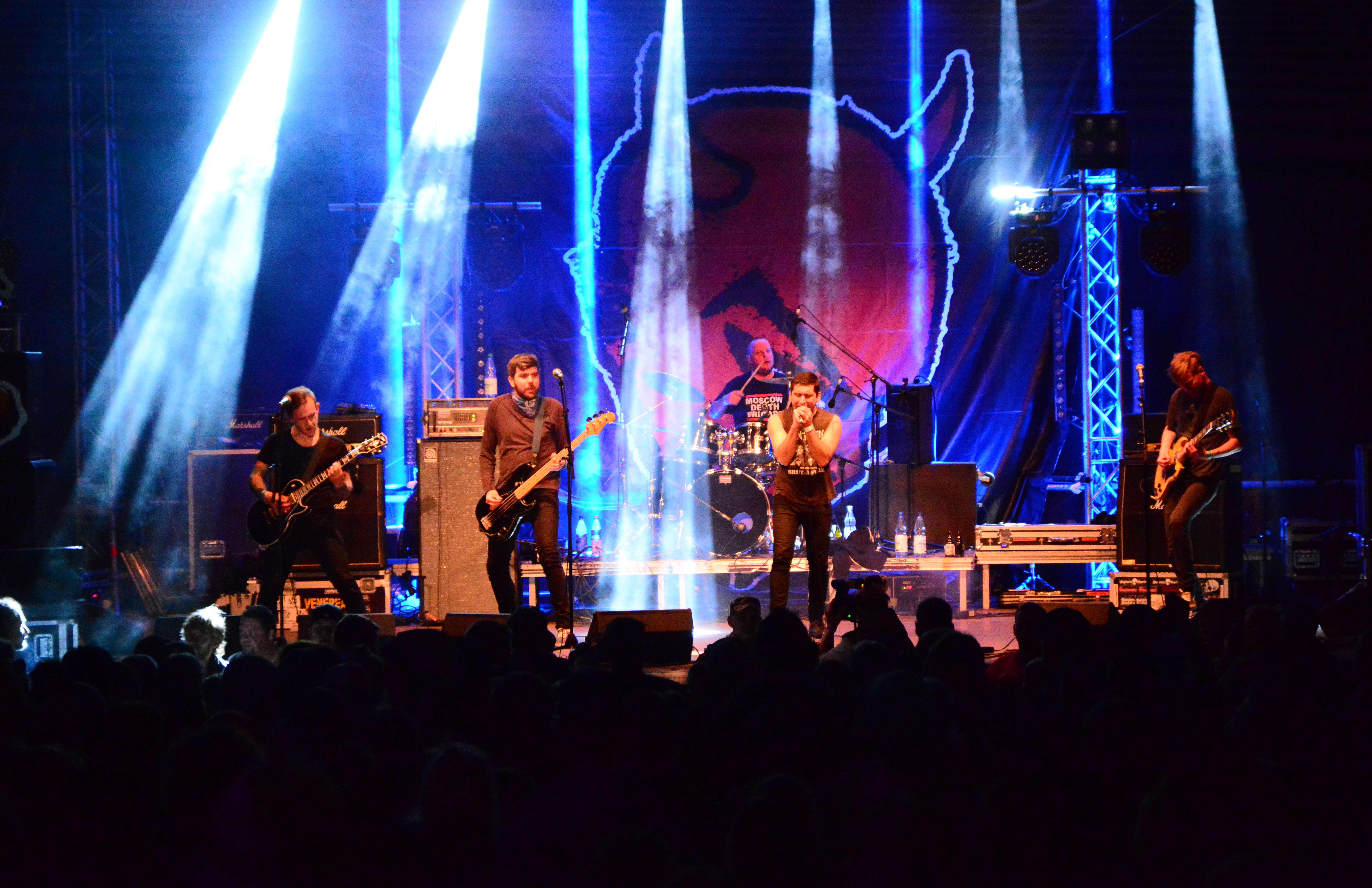 Satanic Surfers beim „Wilwarin Festival 2015“